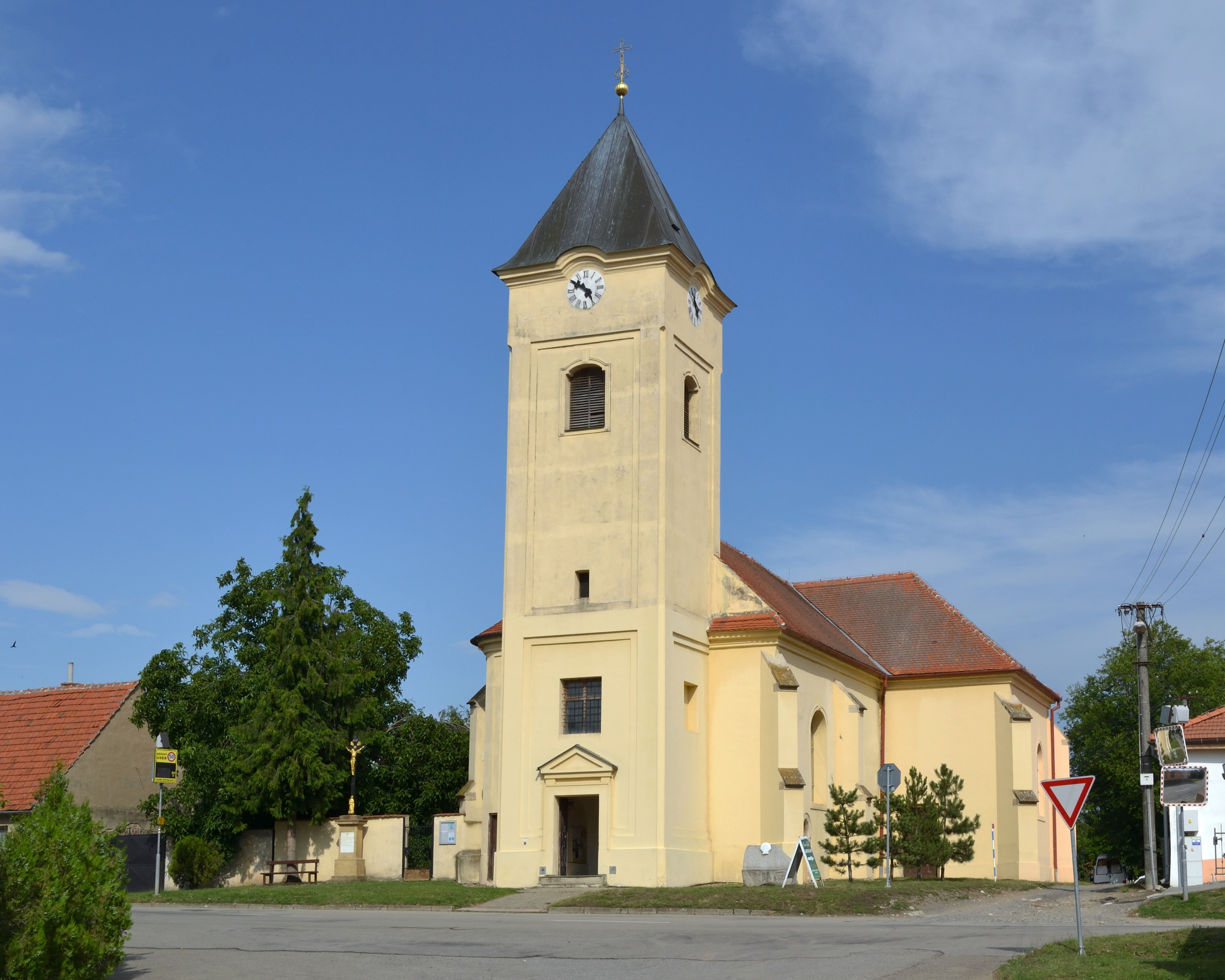 Strachotín - kostel sv Oldřicha